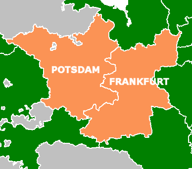 Regierungsbezirke in Brandenburg 1878